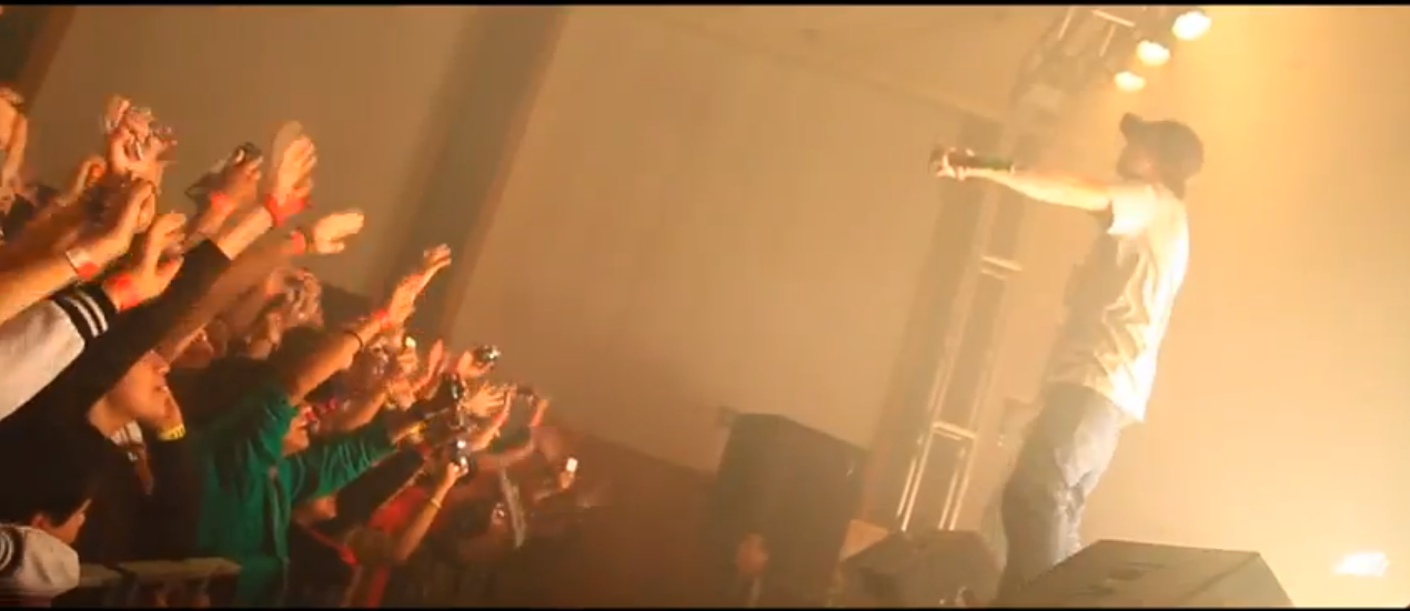 Porta